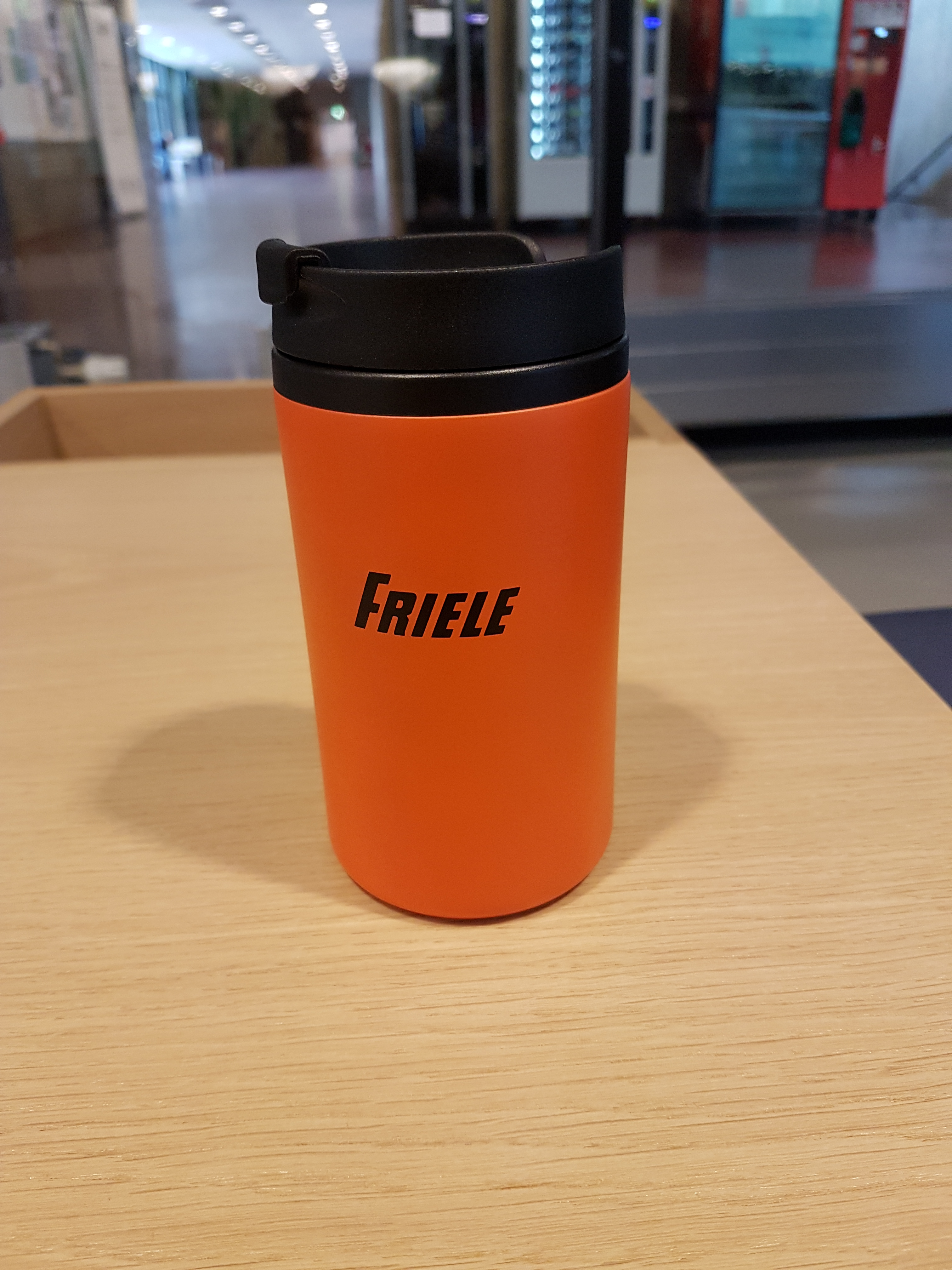 En termoskopp